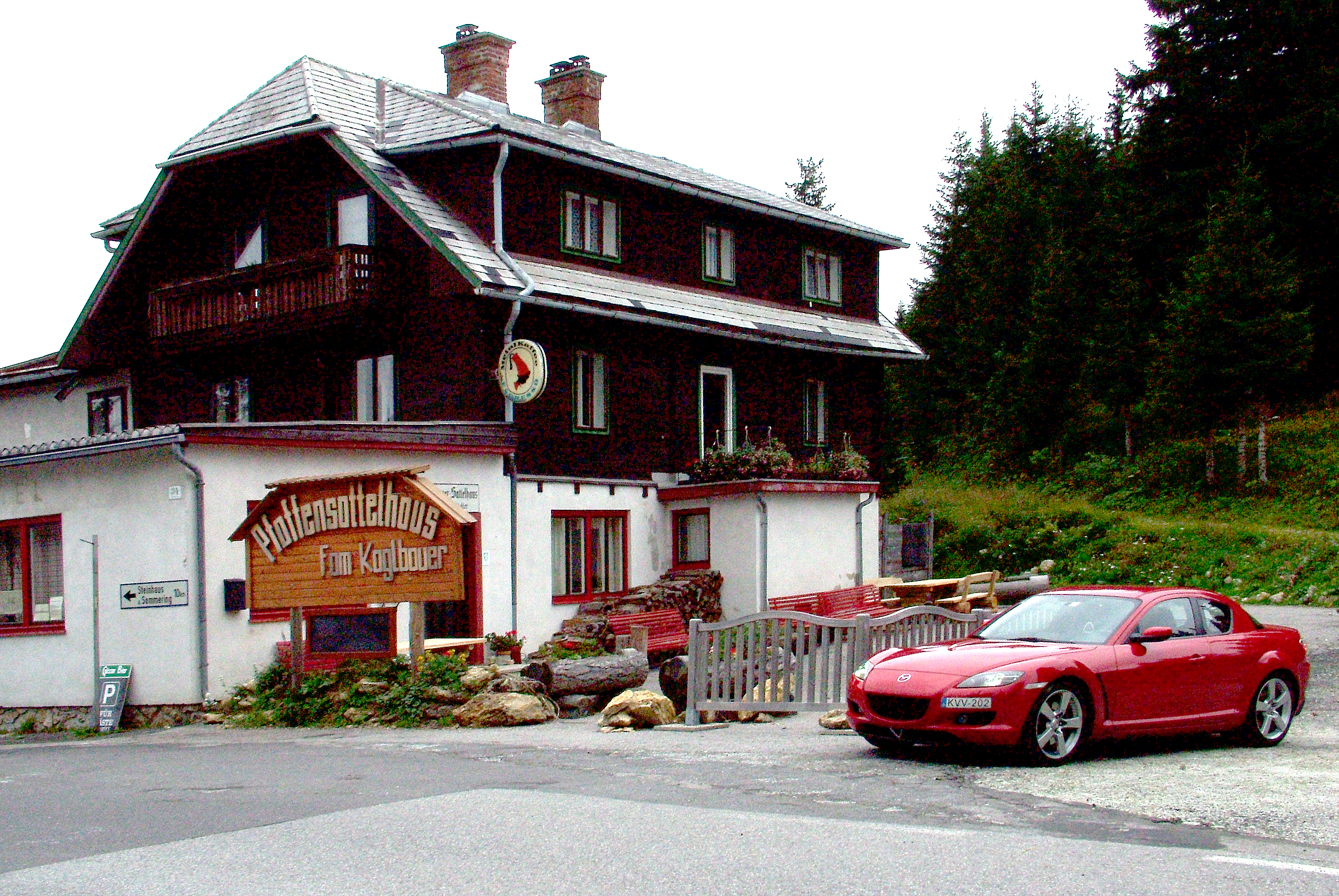 Fogadó a Pfaffen-hágóút mellett (Stájerország, Ausztria)